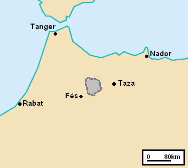 Localisation du pays Hyayna, selon Mohamed El Moubaraki, « Marocains du Nord: entre la mémoire et le projet » [1], L'Harmattan 1989 (ISBN:9782738400505), pp.24&30